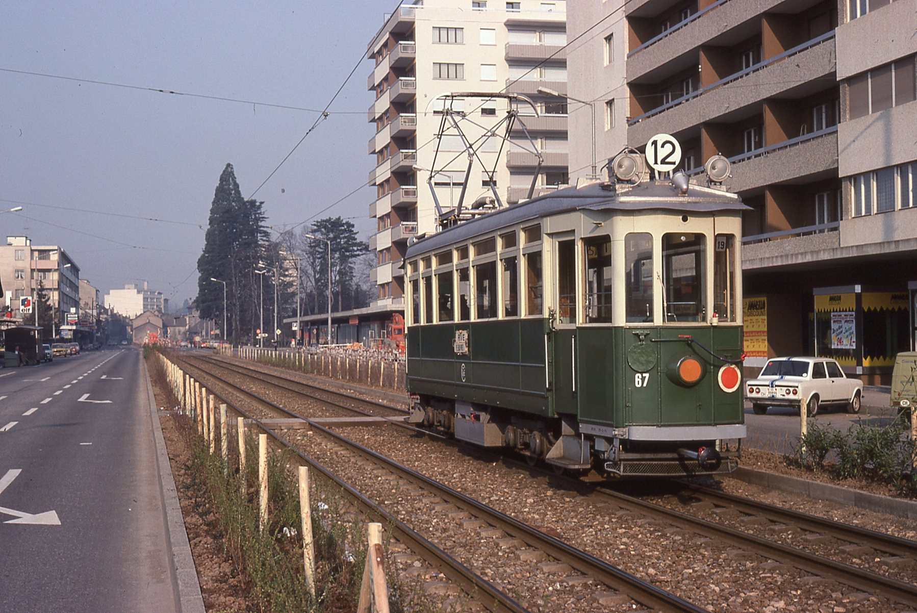 Photo. Trams aux Fils. Rue de Genève après les travaux, Ce site est resté jusqu'en juillet 2008, il a été reconstruit du 12 au 23 juillet 2008 en écartant les voies et il n'est plus en rails vignole et sur ballast mais en rails noyés dans du béton et du bitume.